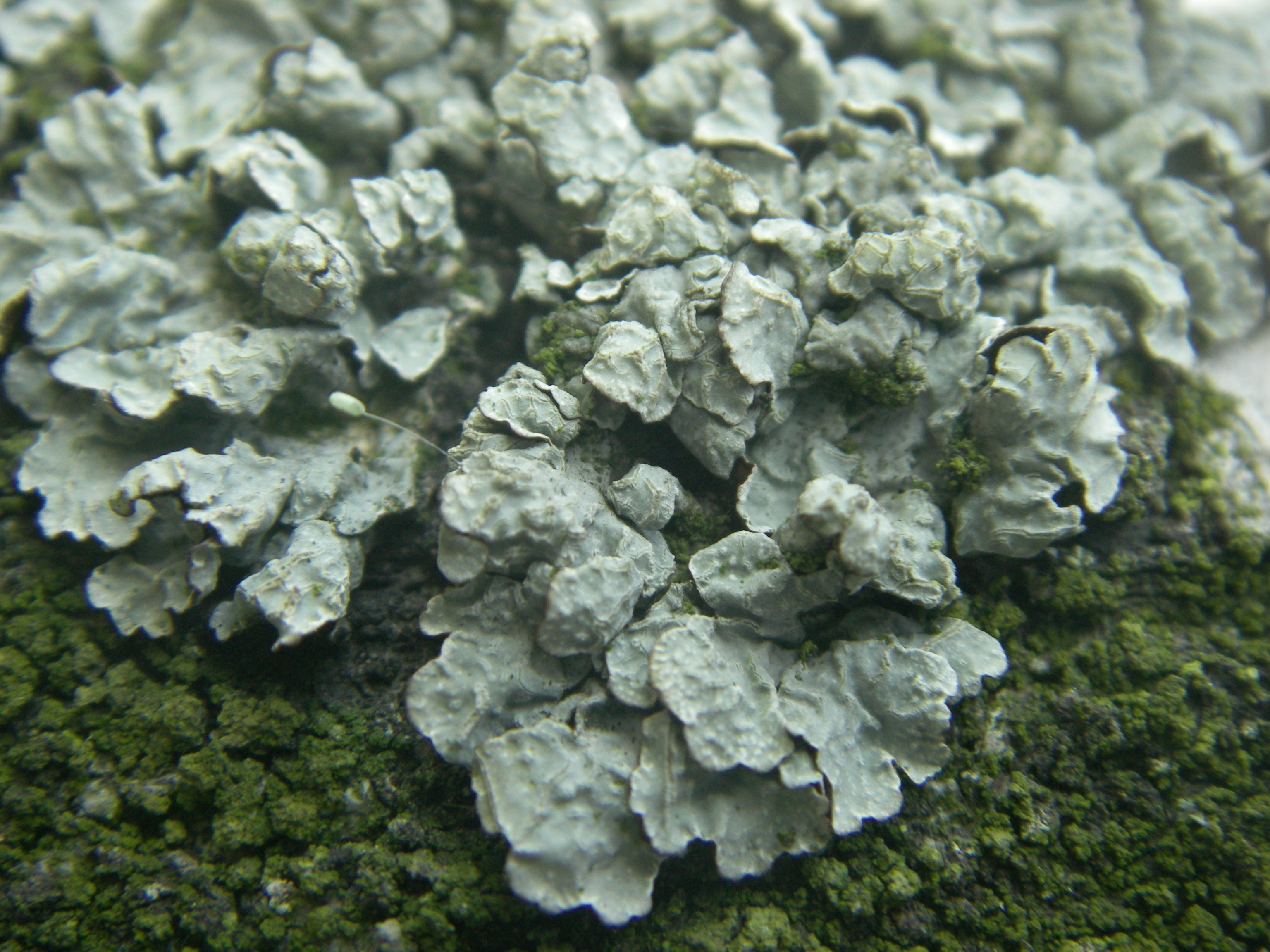 Лишайник, тип 2 (не известен). Кора берёзы в Таврическом саду Санкт-Петербурга